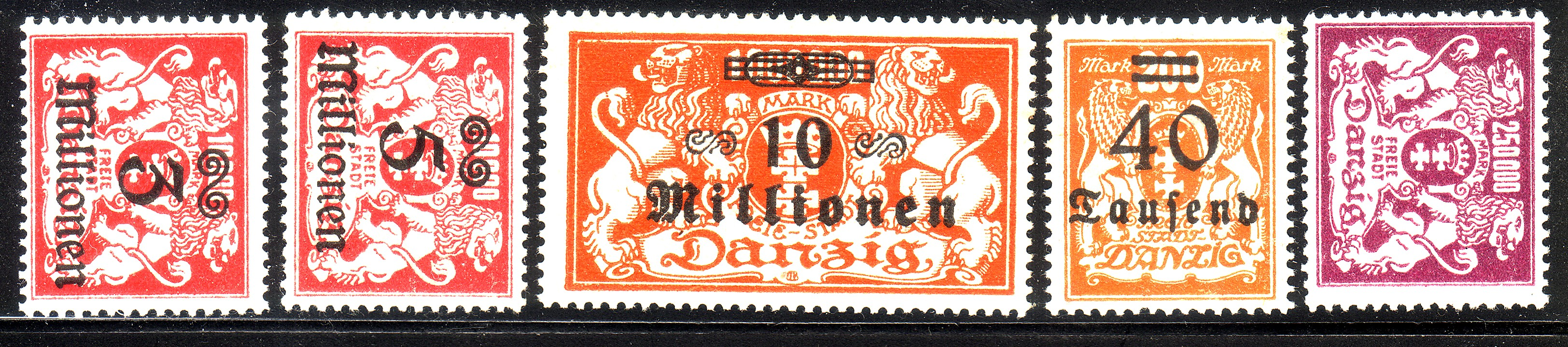 Почтовые марки вольного города Данцига периода гиперинфляции, 1923 год.